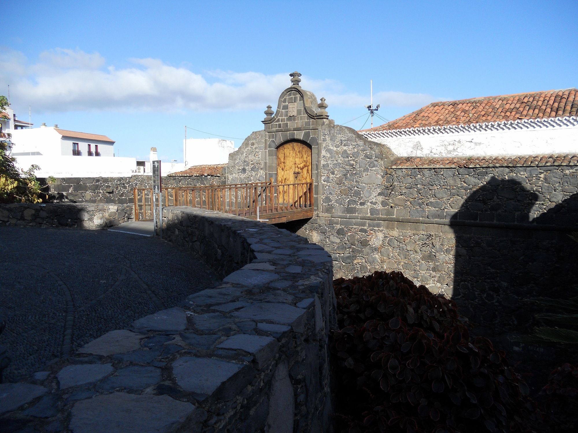 Ingresso superiore al Castillo de Santa Catalina in Santa Cruz de La Palma